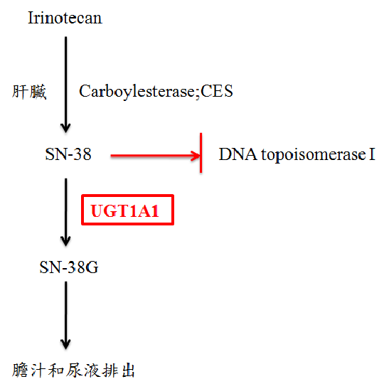 Irinotecan作用機制